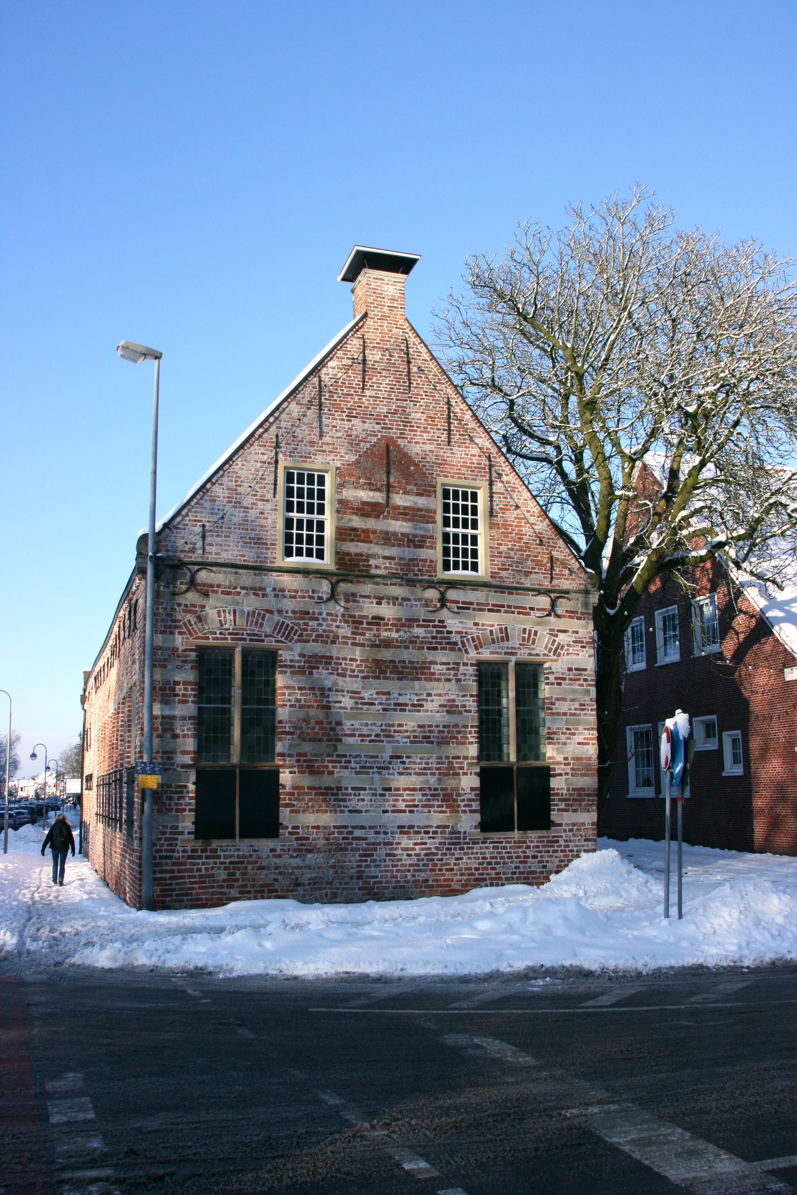 Das Haus Vienna in Norden (Ostfriesland)